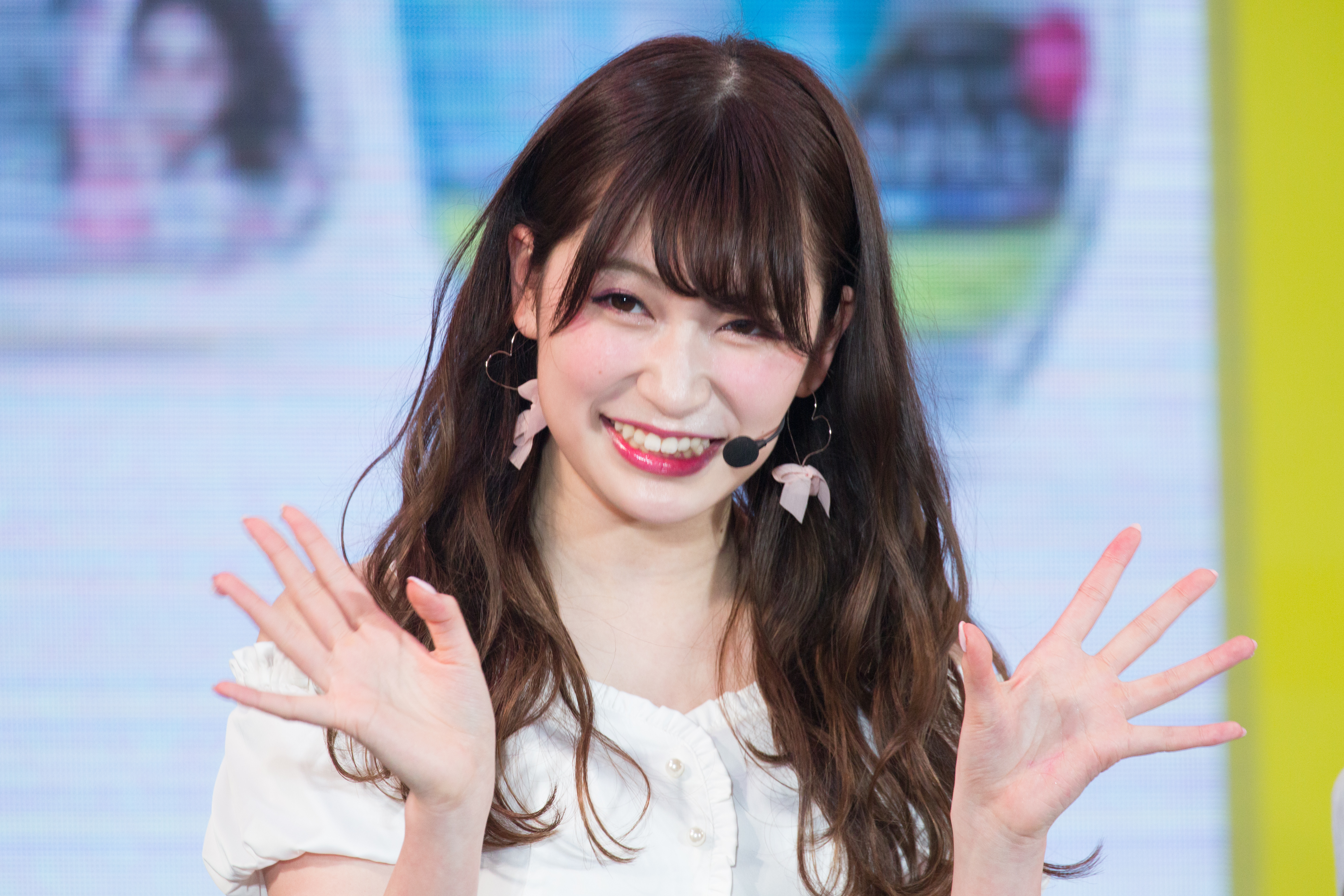 Super! C CHANNEL 2017 吉田朱里